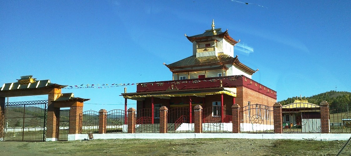 Ust-Burgaltai datsan, Buryatia, Russia